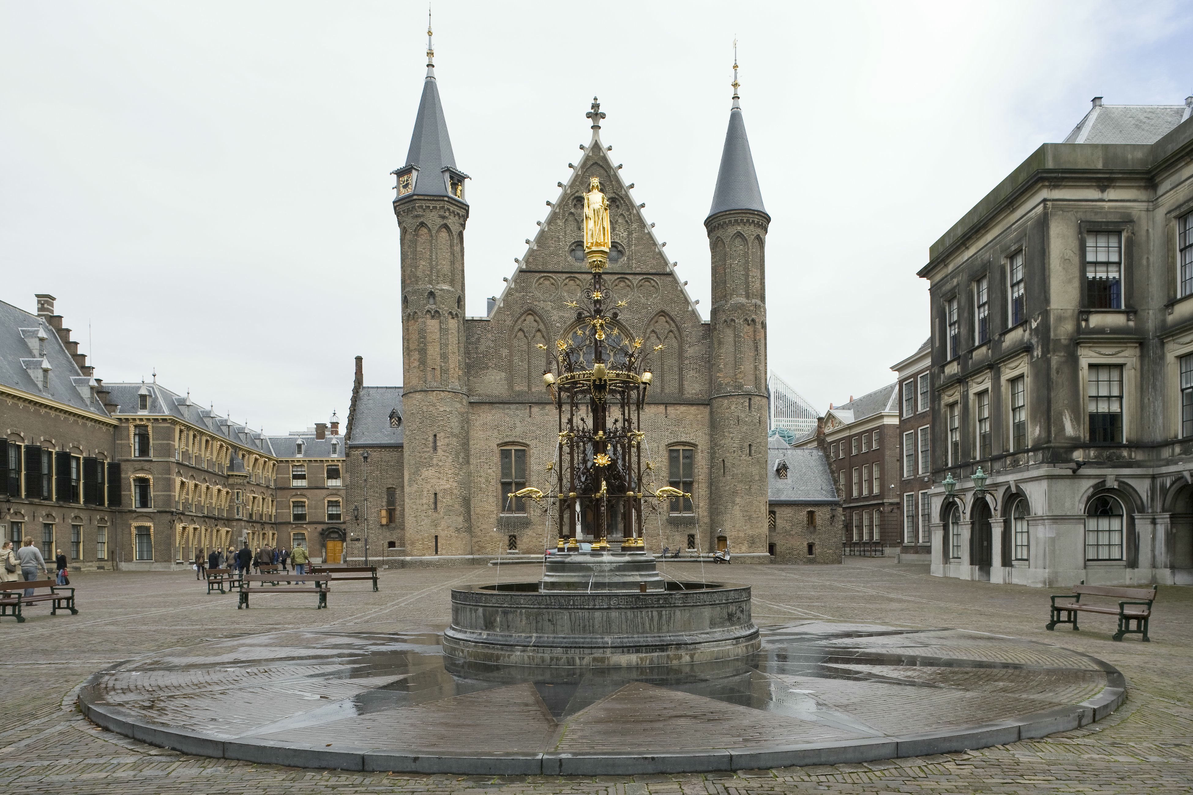 Fontein Binnenhof: Overzicht van de fontein, de Ridderzaal met het Binnenhof op de achtergond (opmerking: Opdracht t.b.v RACM Nieuwsbrief (nr: 1-januari 2008))